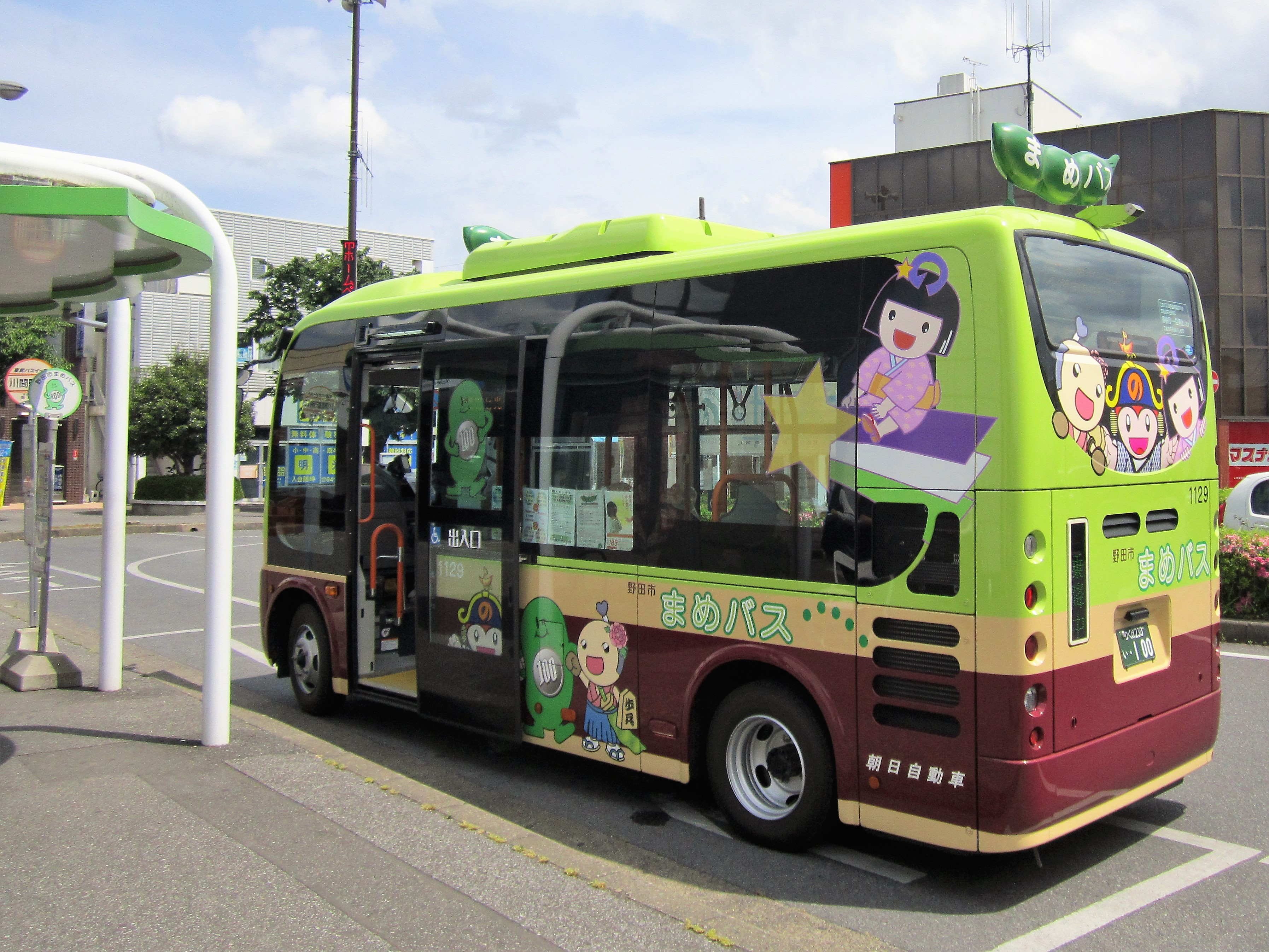 まめバス（朝日自動車車両、川間駅南口） Canon PowerShot A2200